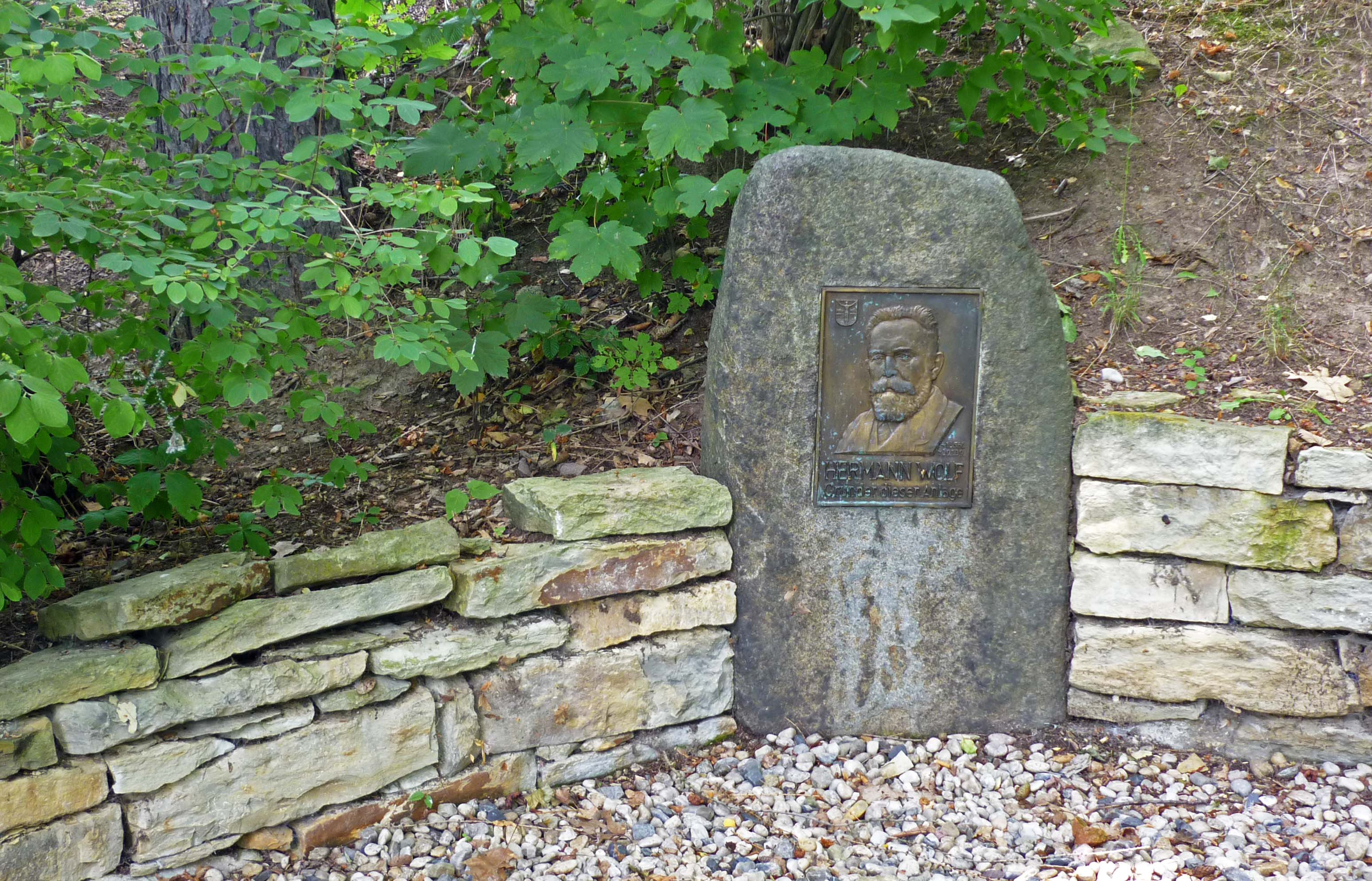 Hermann-Wolf-Denkmal in Freital-Niederhäslich, Rotkopf-Görg-Str.